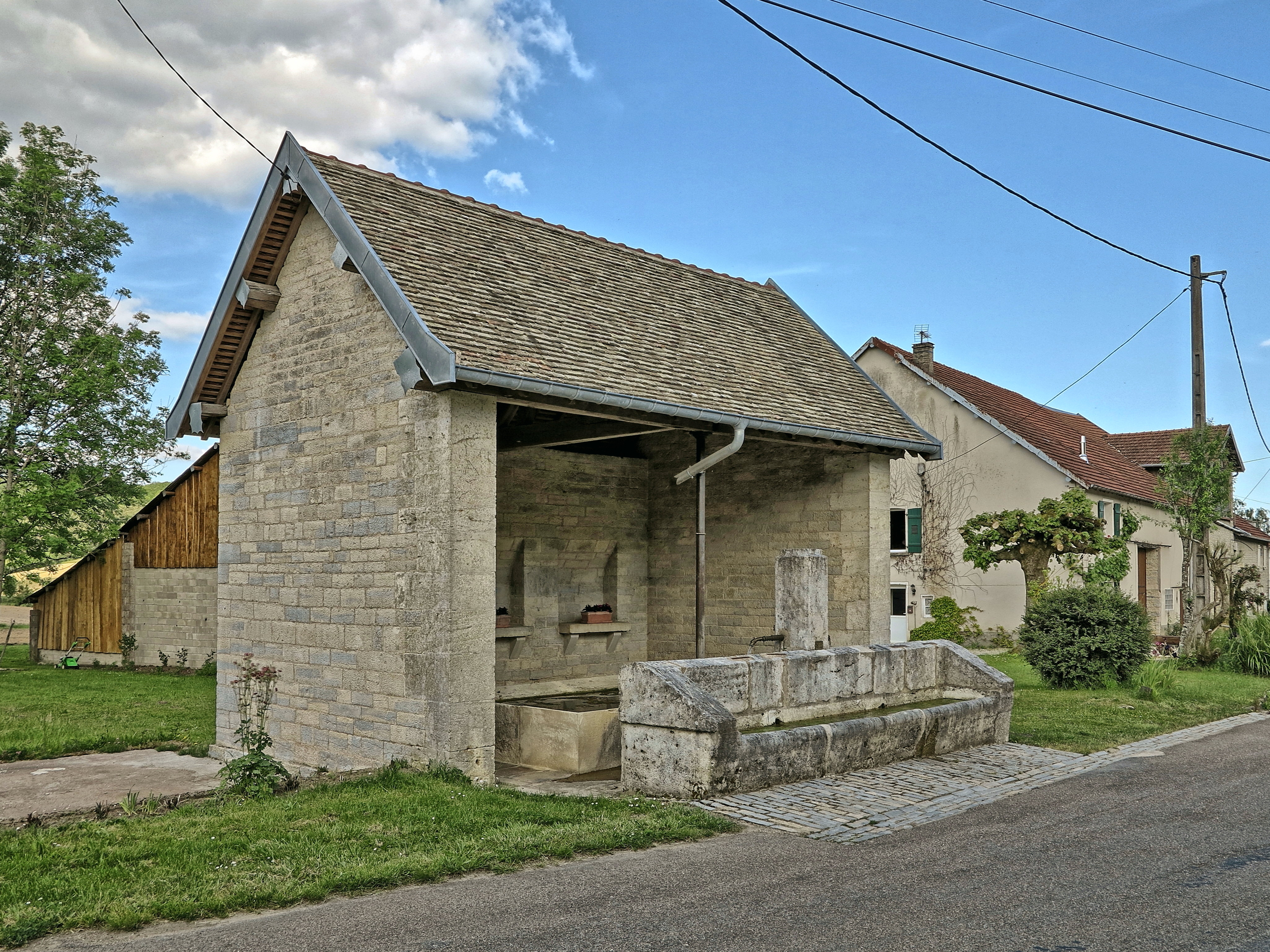 Le lavoir-abreuvoir